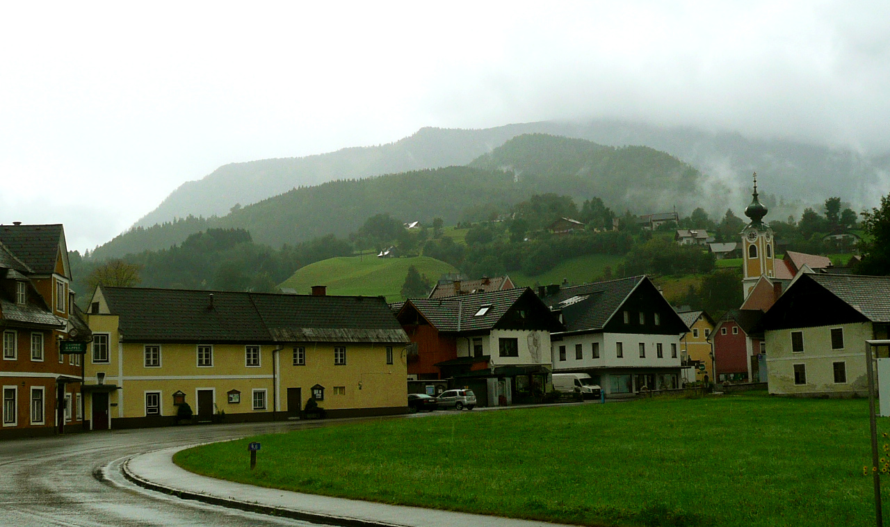 Maisons sympathiques à Sankt-Gallen sous les nuages